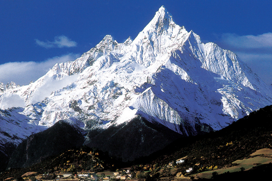 中文（中国大陆）: 梅里雪山